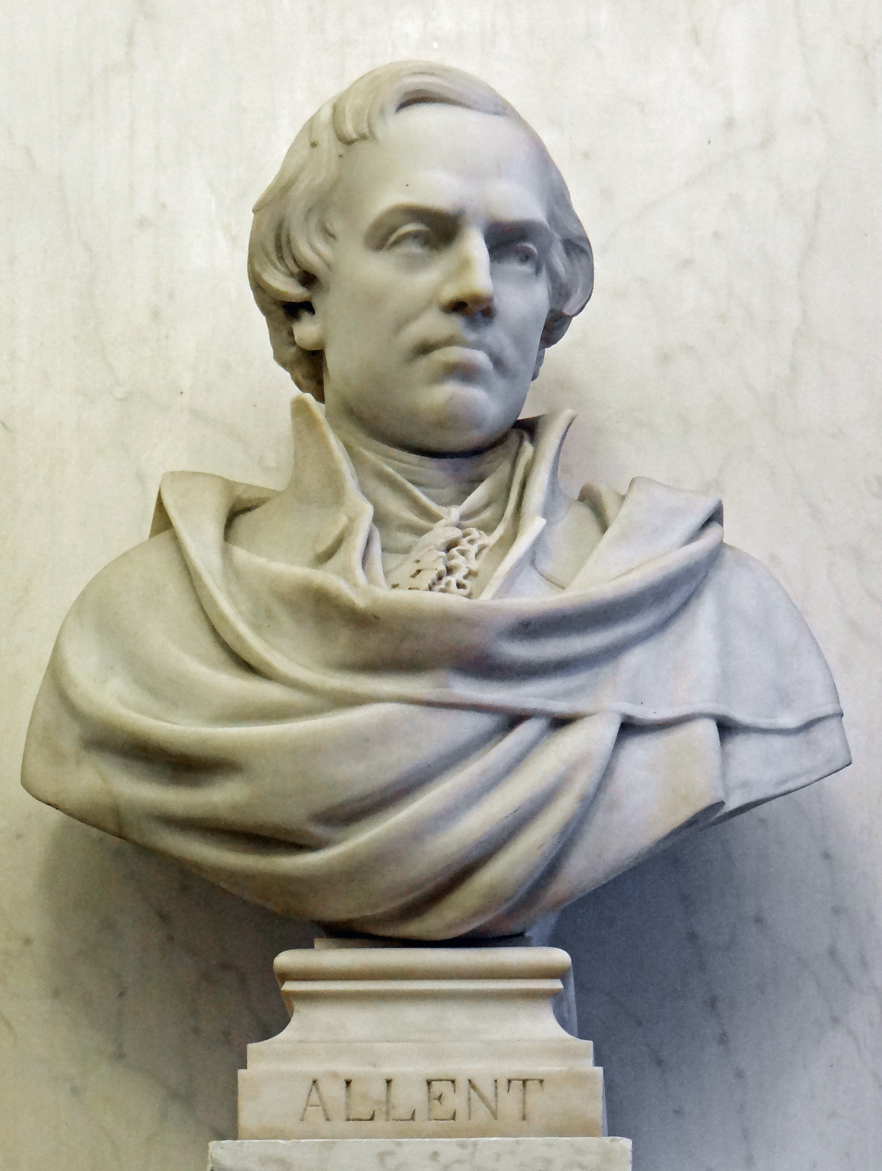 Pierre Alexandre Joseph Allent - Buste dans la bibliothèque du Conseil d'État